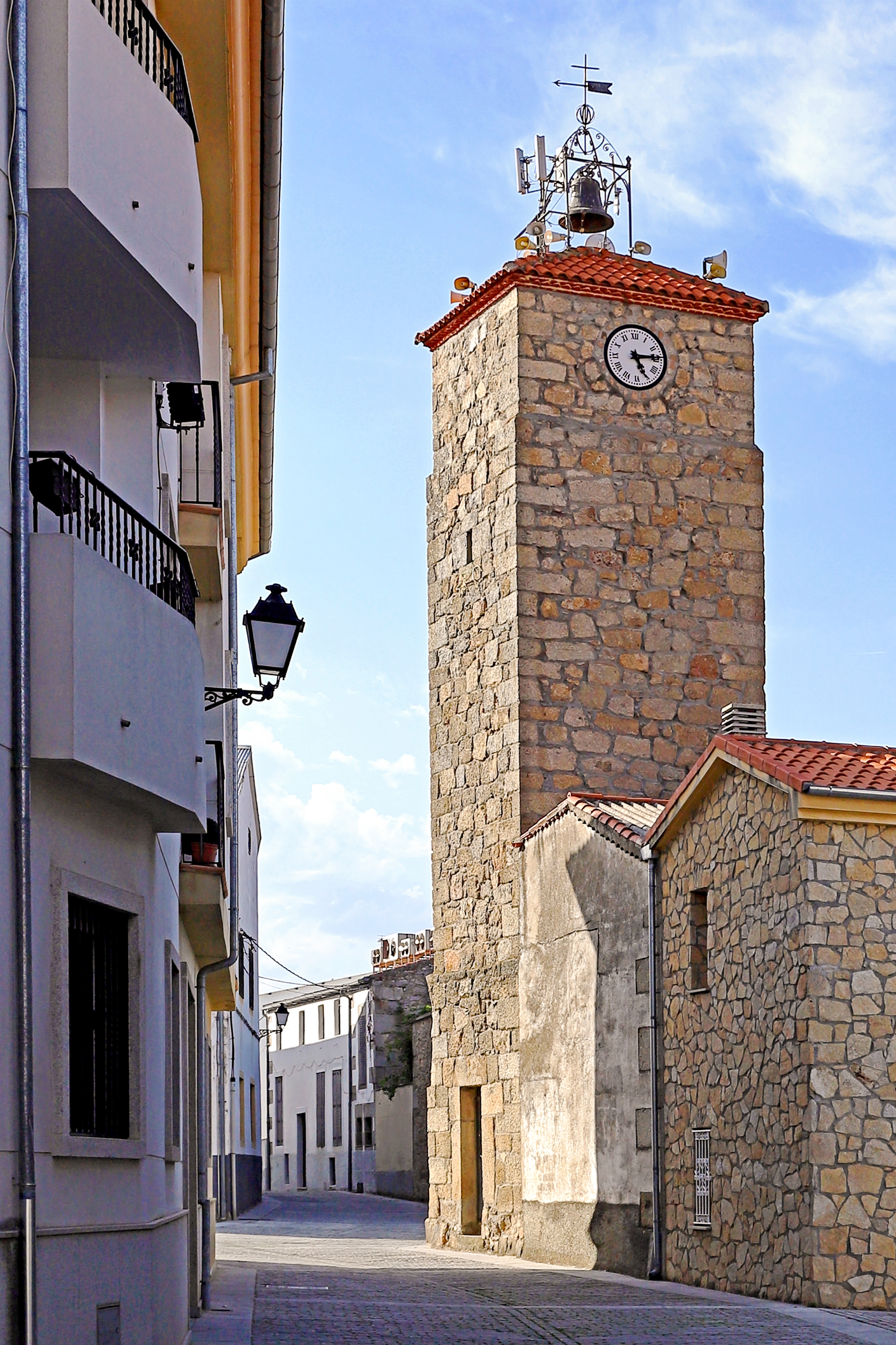 Ledrada es un municipio de la comarca Sierra de Béjar, provincia de Salamanca.